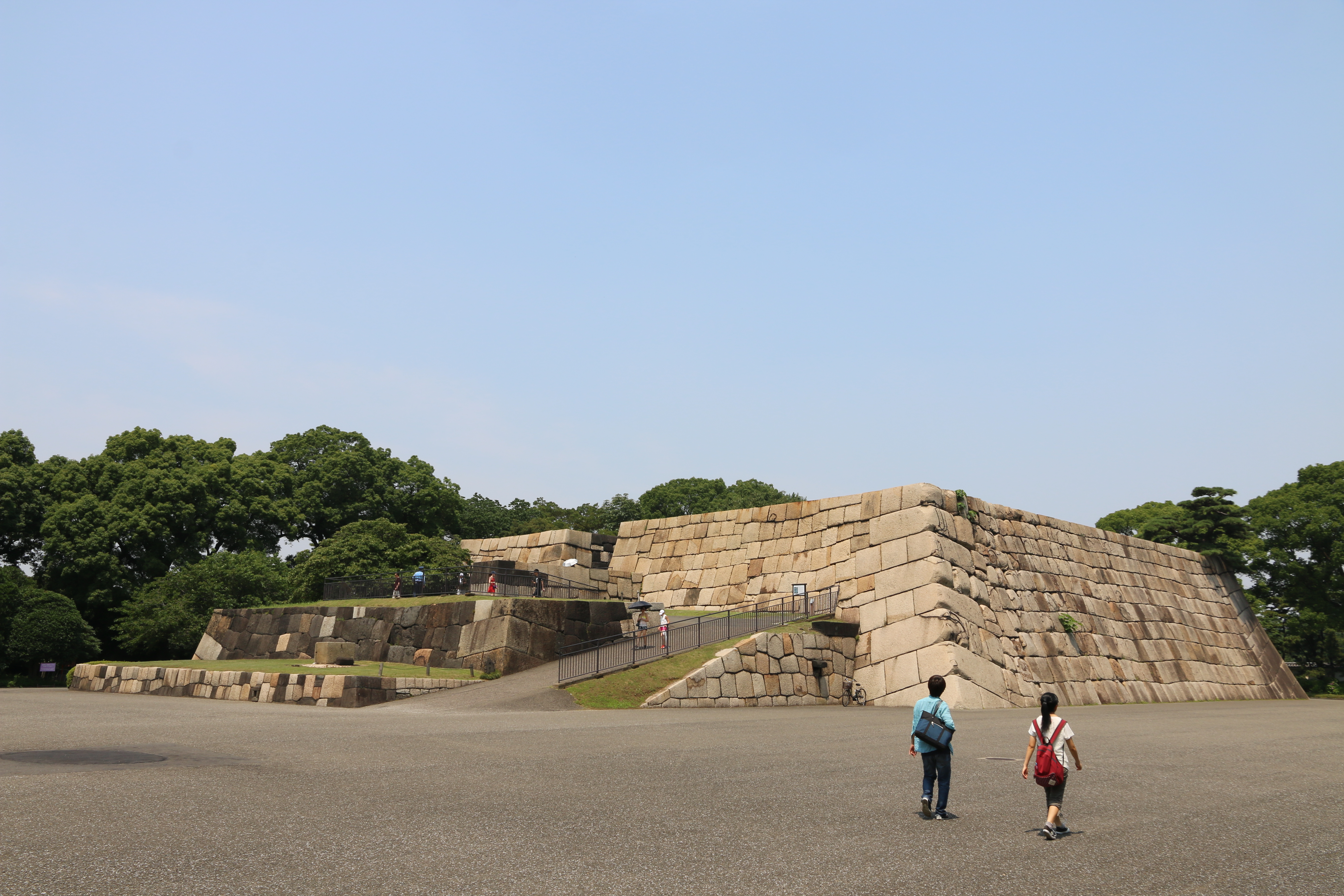 IMPERIAL GARDENS RUINS TOKYO